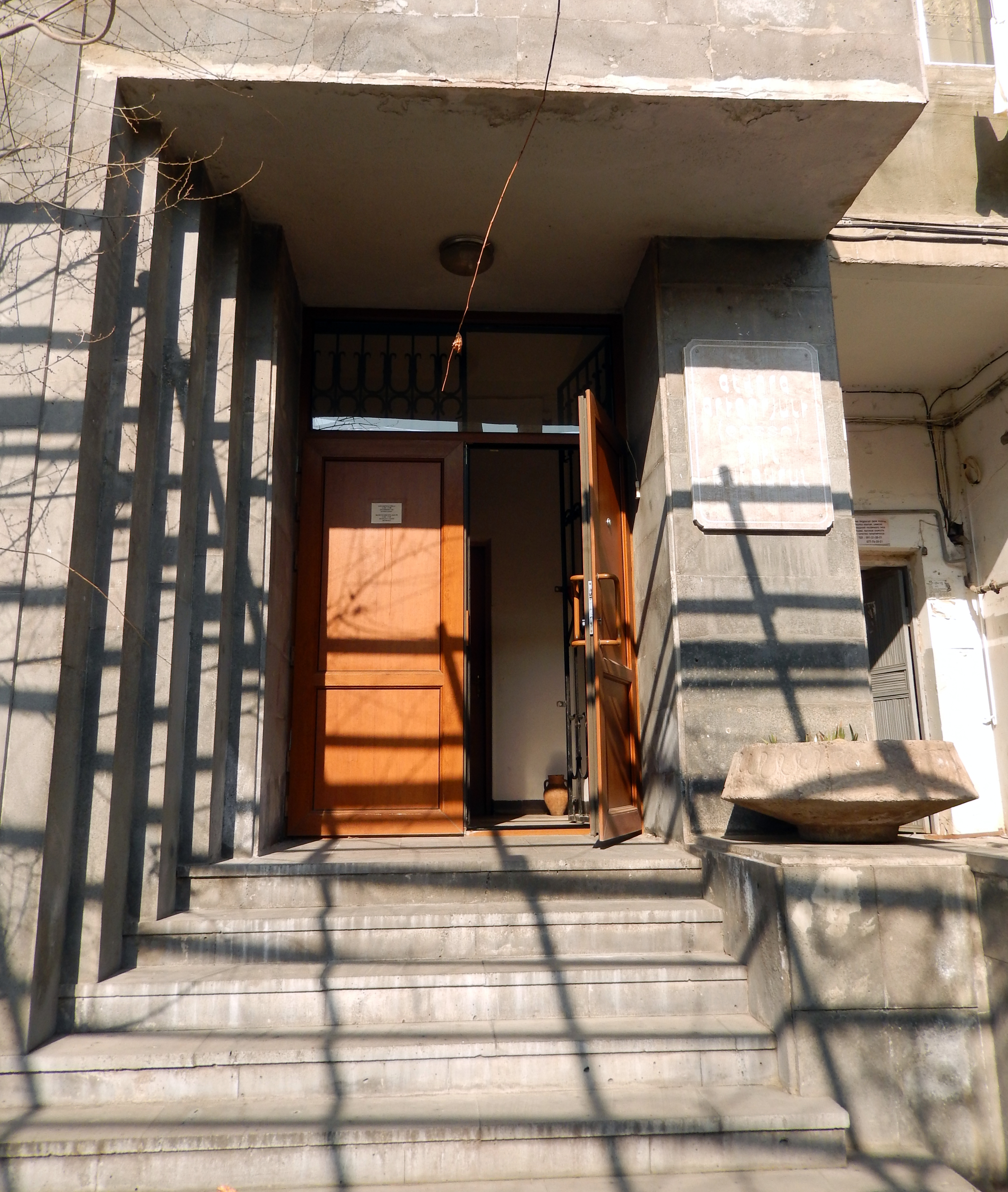 Գևորգ Գրիգորյանի (Ջոտտո) արվեստանոց-թանգարան